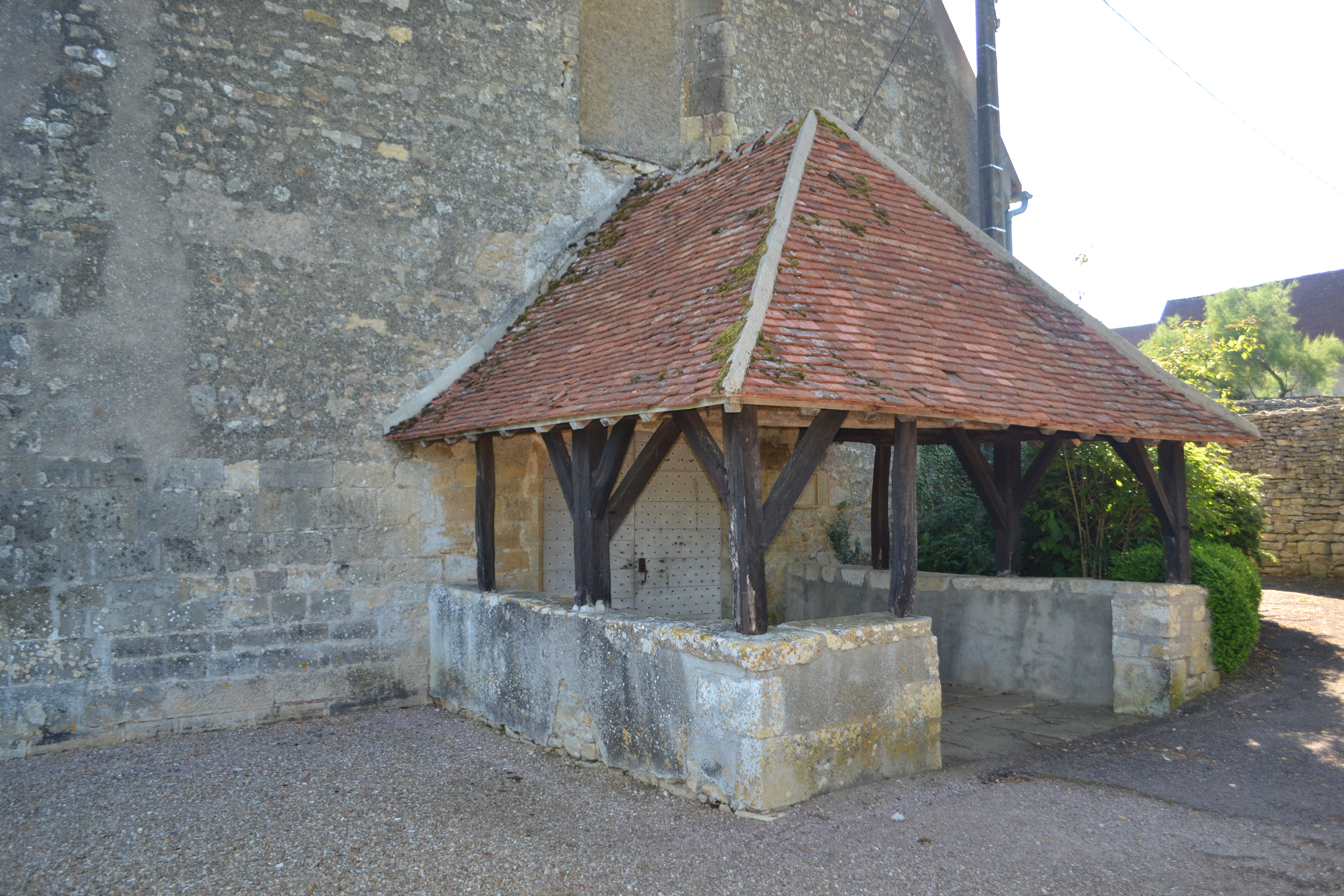 Caquetoire de l'église de Champlemy (Nièvre).